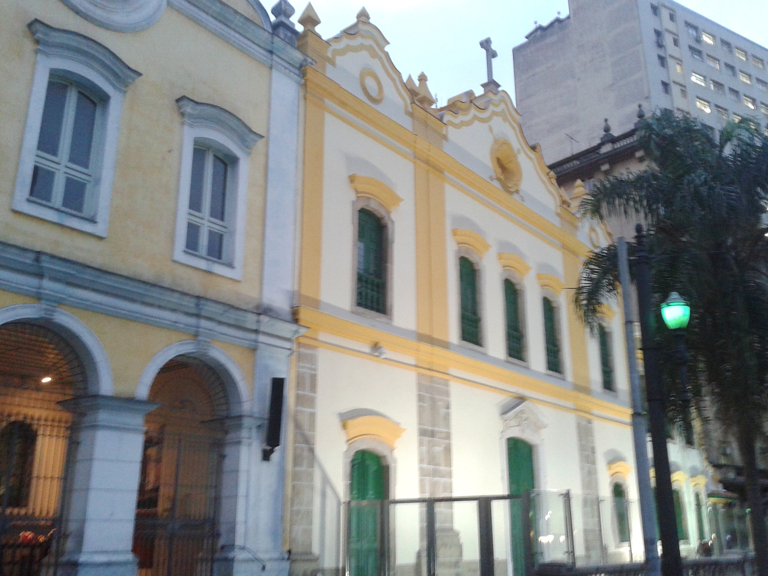 Igreja das Chagas do Seráfico Pai São Francisco, no Largo de São Francisco, distrito da Sé, São Paulo, SP, Brasil.